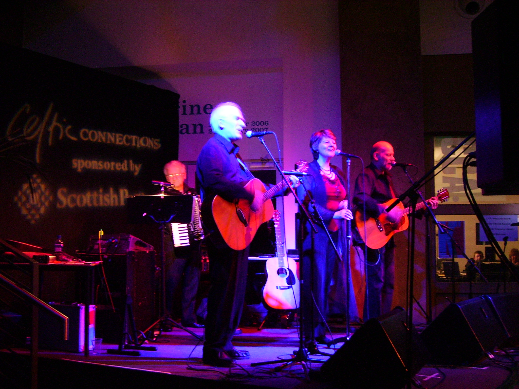 Na h-Oganaich